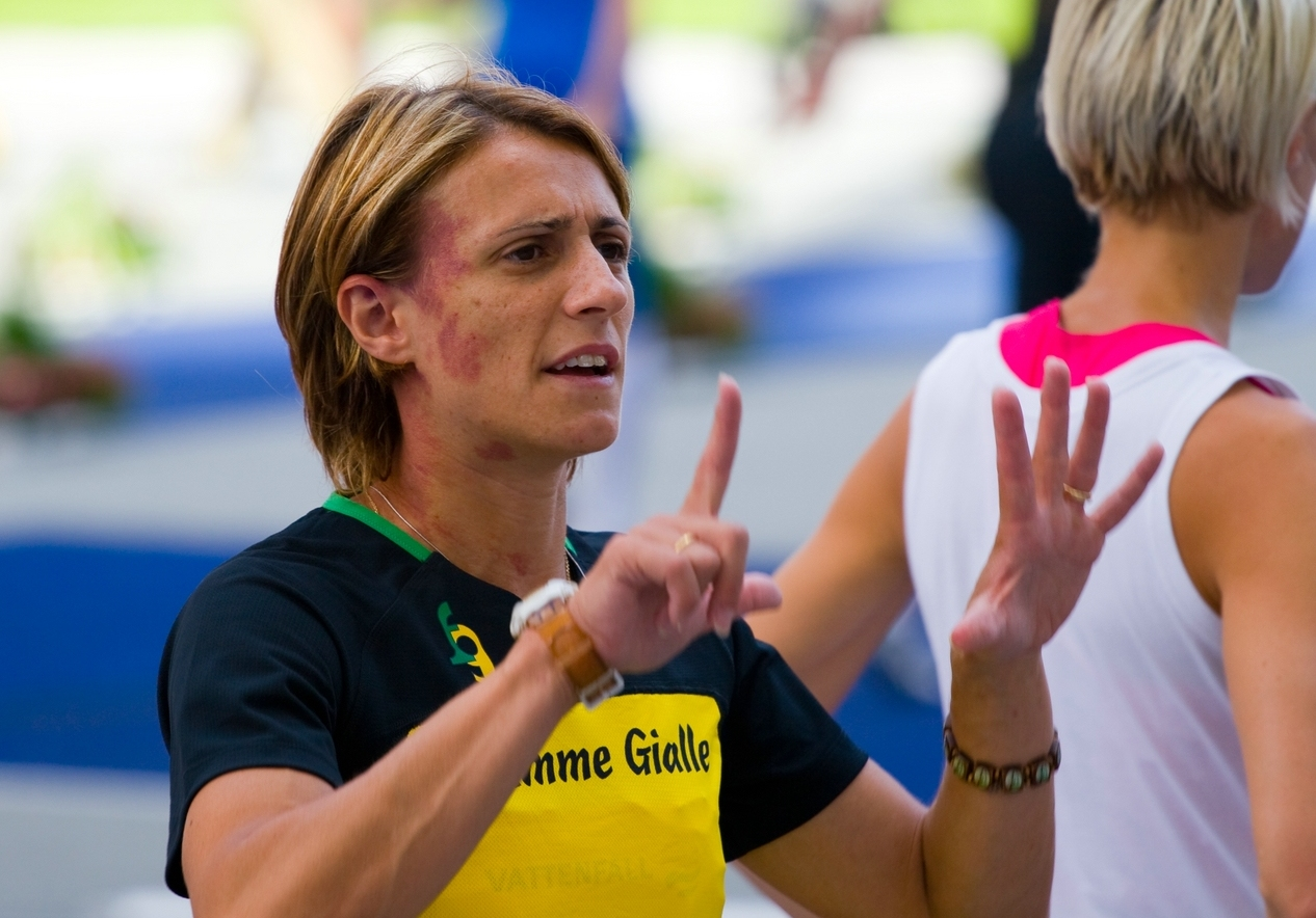 Antonietta Di Martino Hochsprung